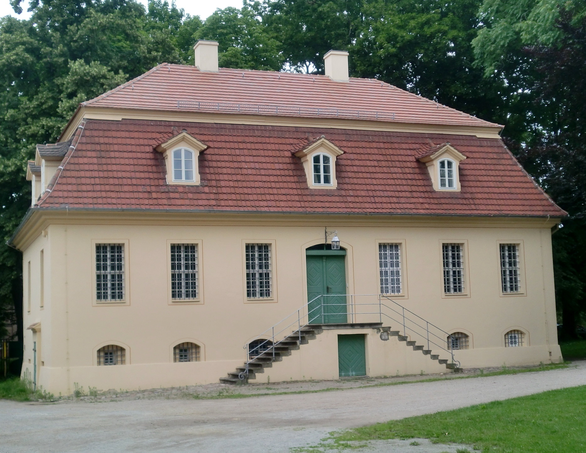 Alte Kanzlei im Schloss Lübbenau, Parkseite